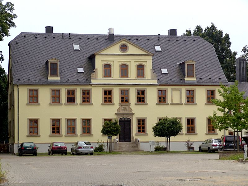 Herrenhaus des Guts Knauthain, Zustand Sommer 2006